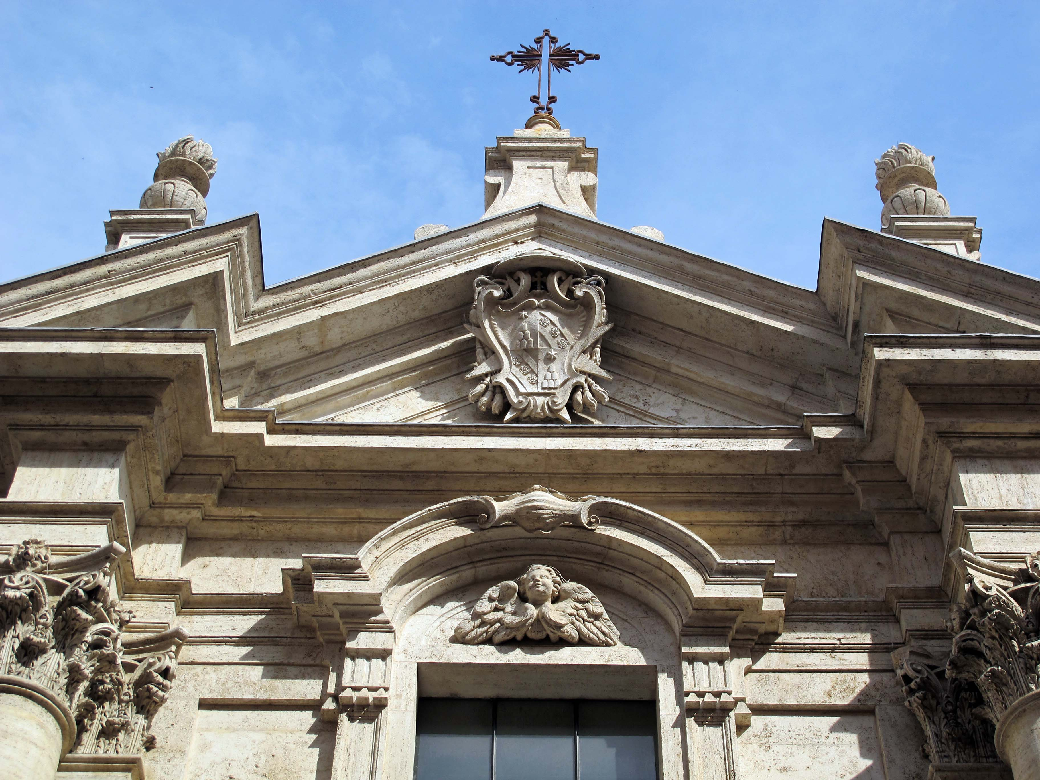 Siena